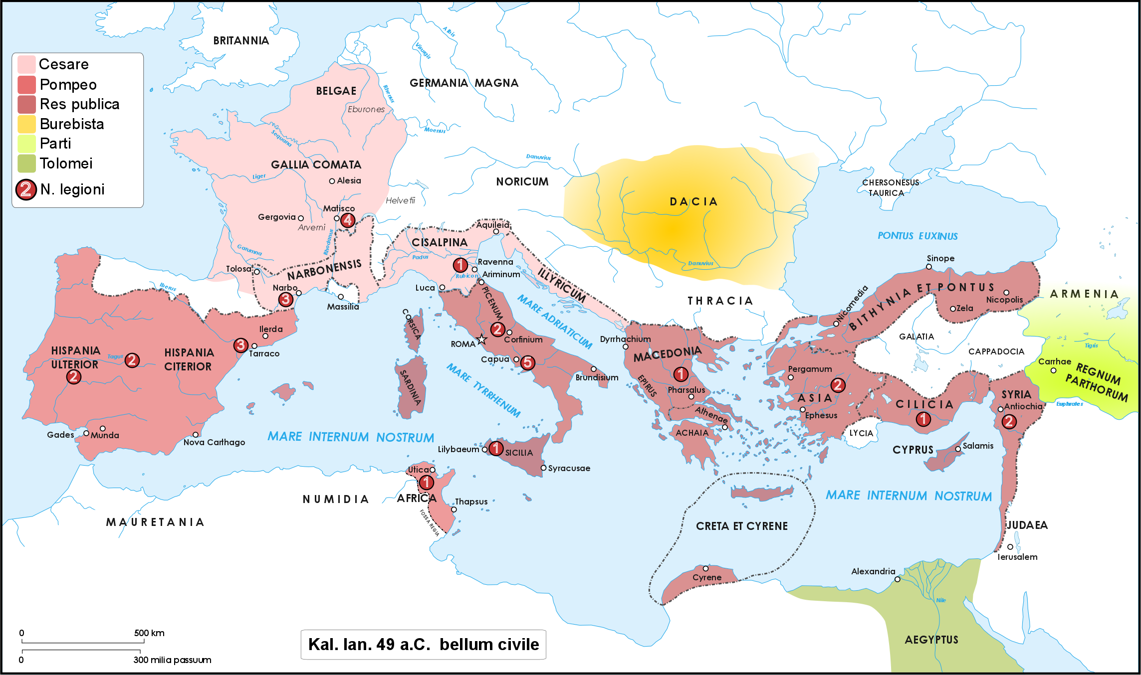 Il mondo romano allo scoppio della guerra civile il primo gennaio del 49 a.C.